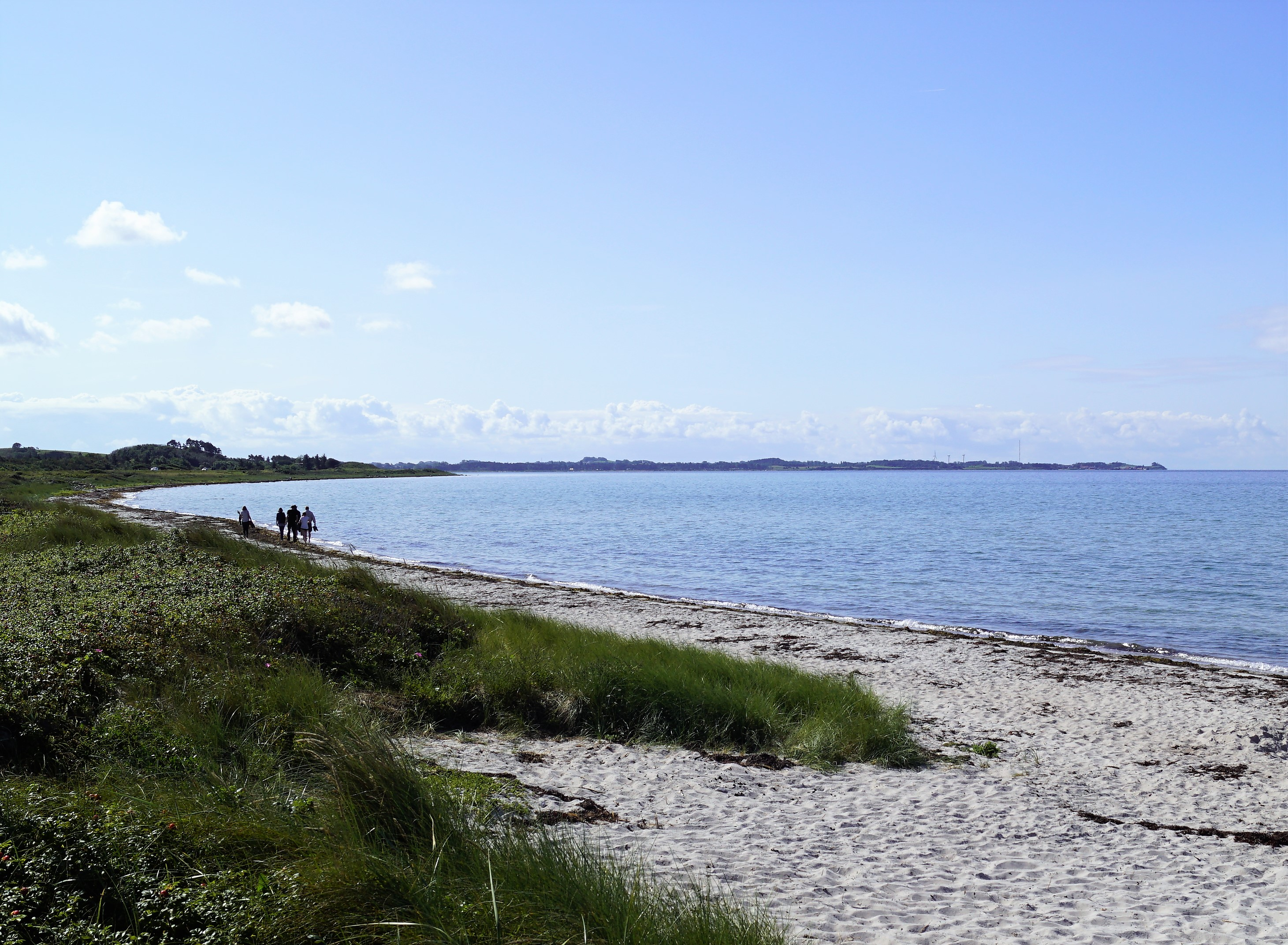 Sælvig set mod sydvest fra Kanhavekanalen